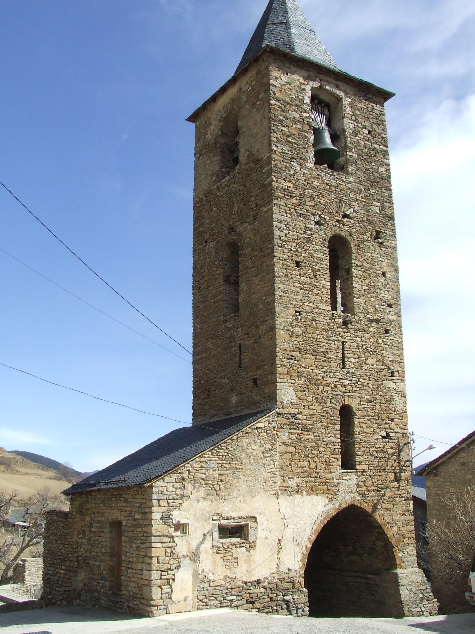 Sant Pere de Llessui (Sort, Pallars Sobirà)